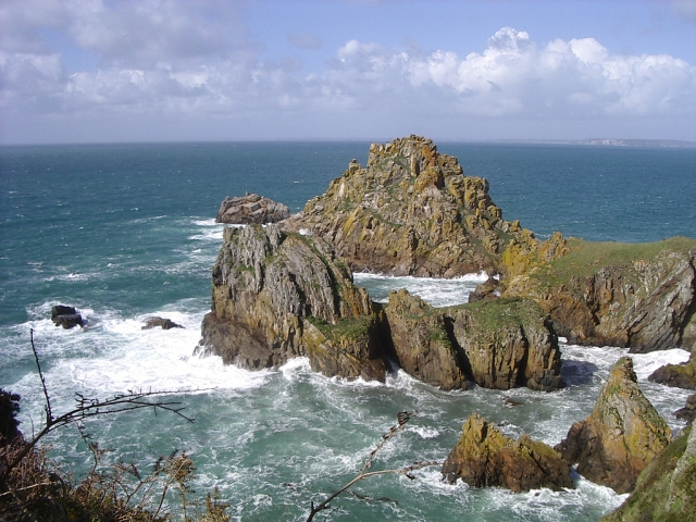 îlot du Milinou Braz (Goulien, Finistère, France)